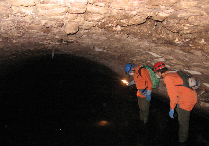 Veduta dell'antico fiume Garza nei sotterranei di Brescia. Foto dell'associazione di speleologia urbana "Bresciaunderground".